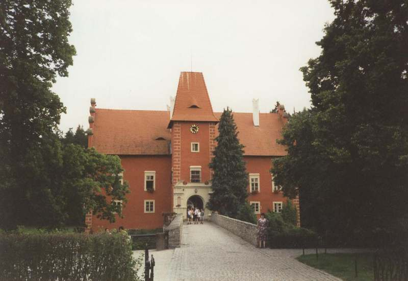 Zámek Červená Lhota